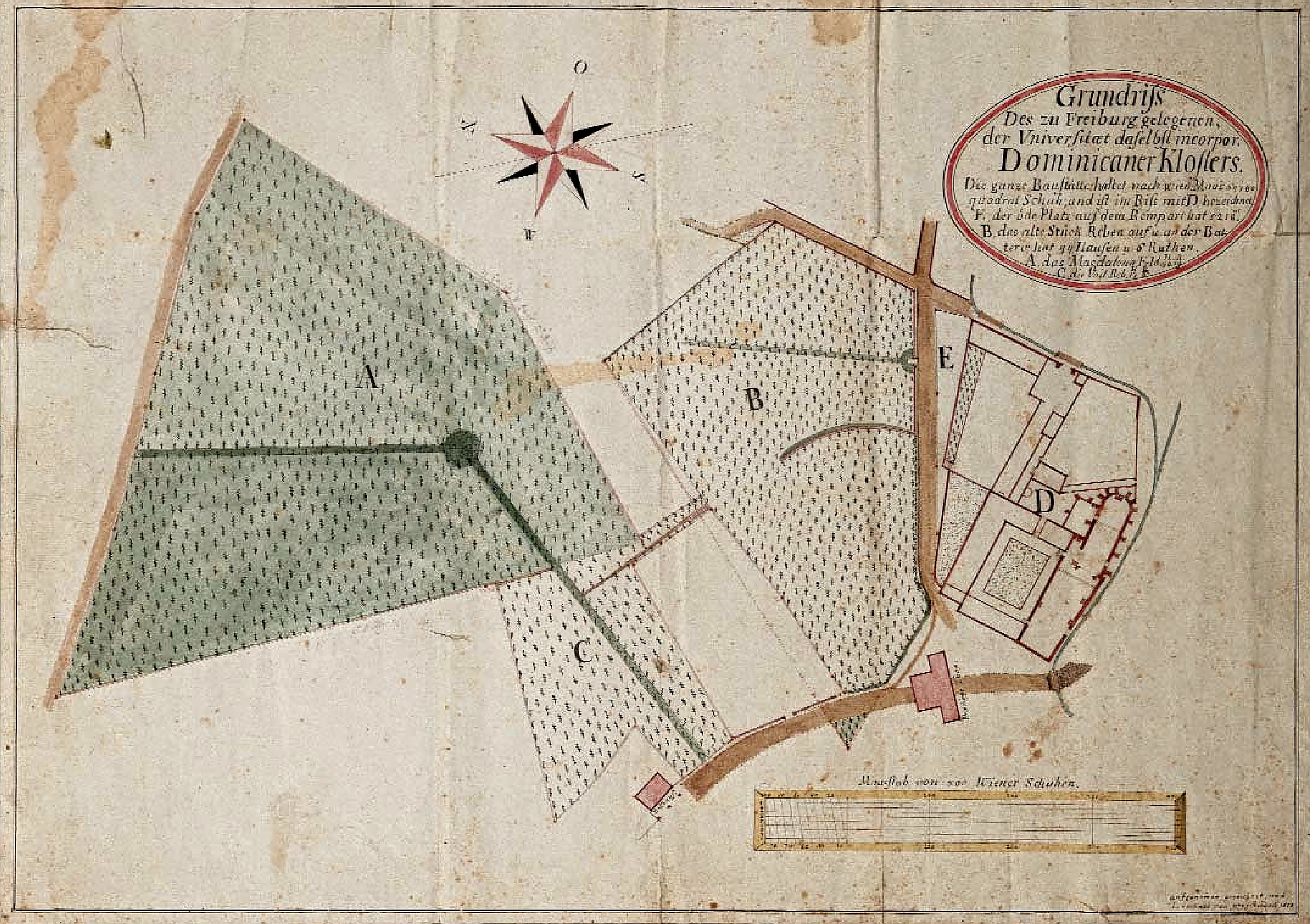 Plan des Klosters und der zugehörigen Grundstücke